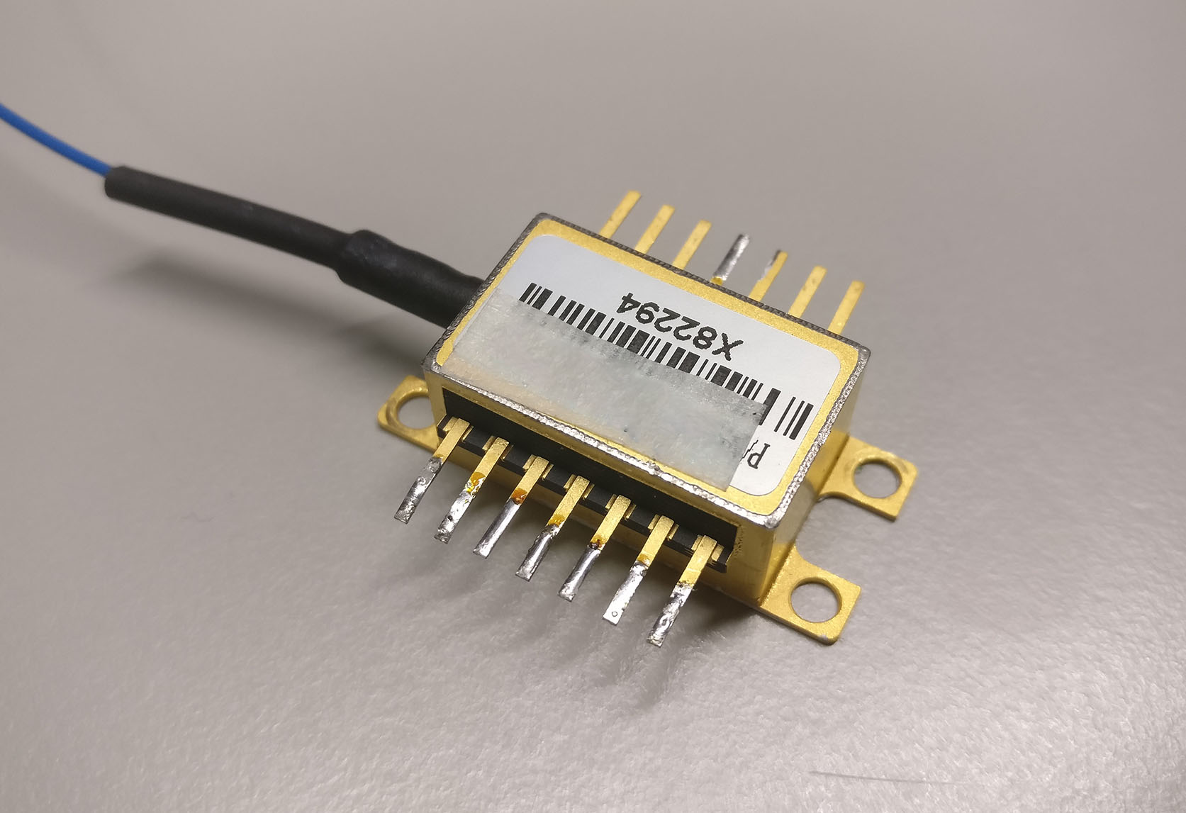 Корпус лазерного диода Butterfly